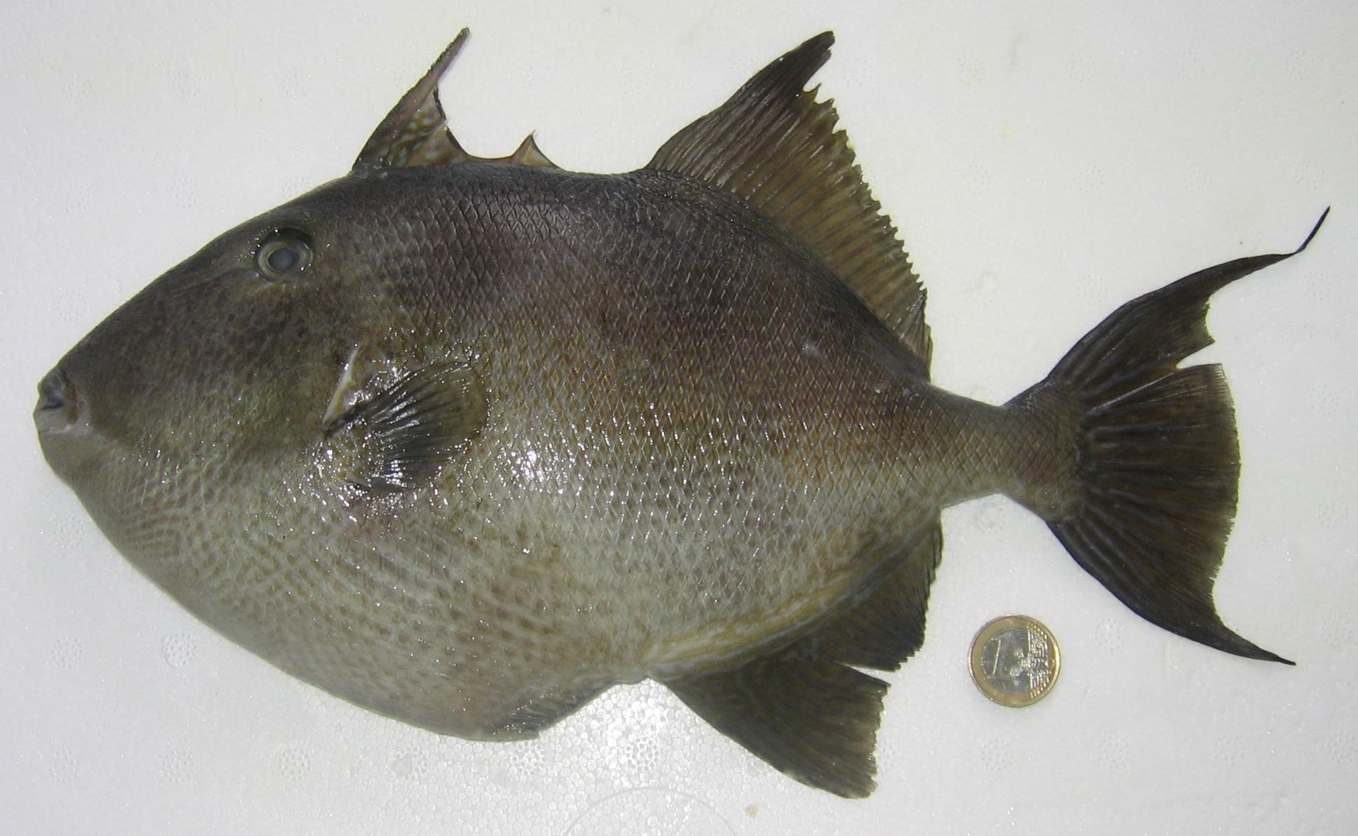 Baliste capturée par Benjamin Mahé, île de Groix, Bretagne, France. Photographiée par Frédéric Mahé le 22 août 2005 à 17h56. Balistes capriscus fished by Benjamin Mahé, island of Groix, Brittany, France. Photo by Frédéric Mahé (2005/08/22 at 5h56 pm).